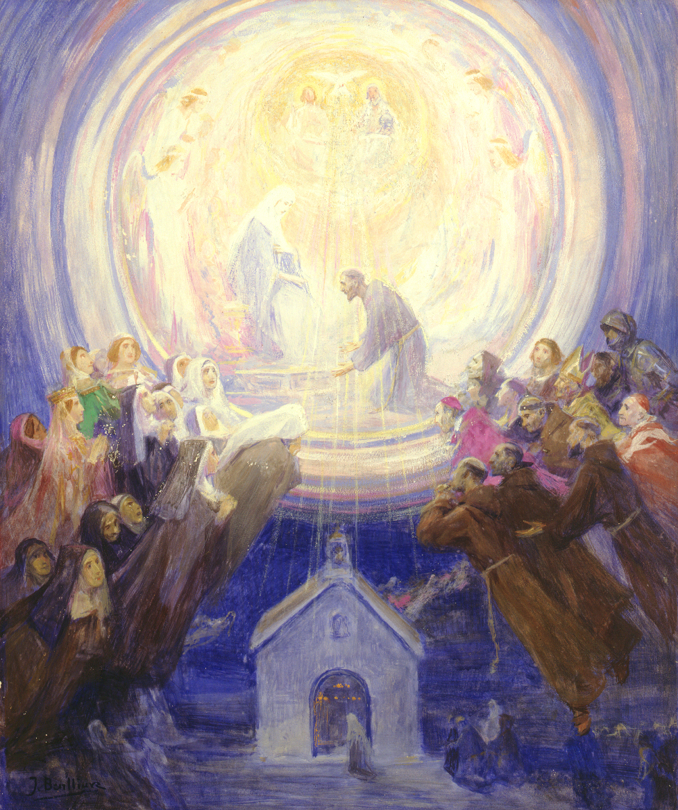 Apoteosis del glorioso Patriarca San Francisco de Asís